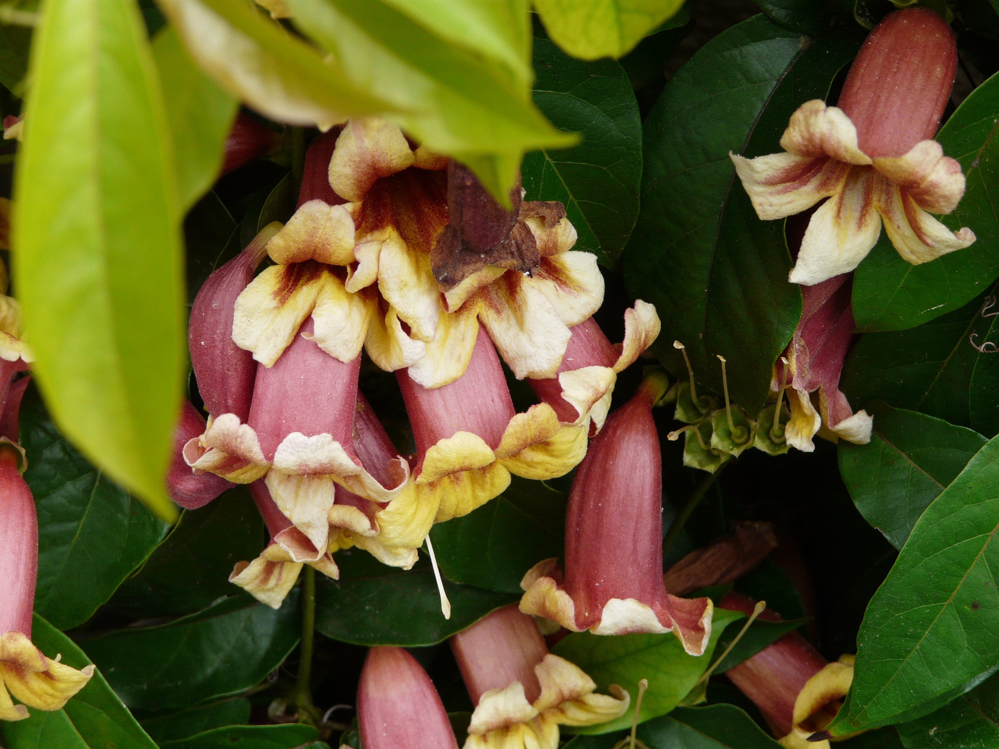 Bignonia capreolata à Périgueux, Dordogne, France.